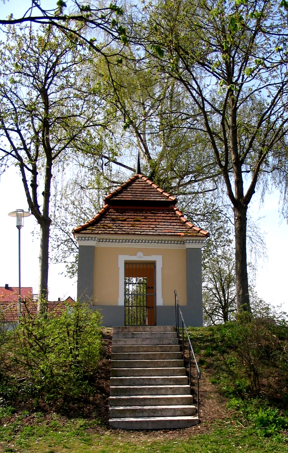 Wall der ehemaligen Stadtbefestigung Neustadt an der Donau: Gartenpavillion des Herrn Prof. Dr. Schnittmann